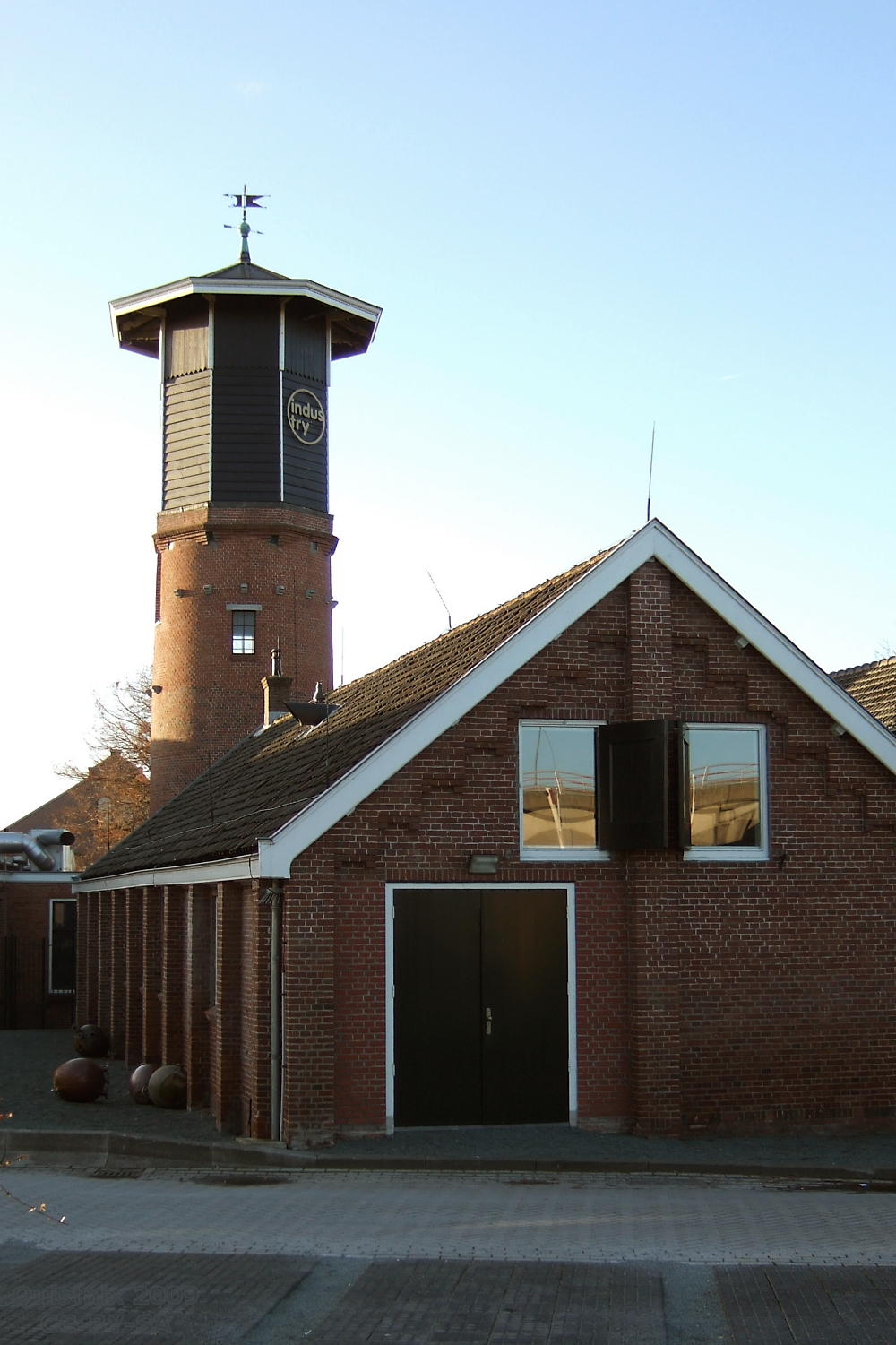 Ouderkerk/Amstelveen: Watertoren van de Kruitfabriek De Oude Molen